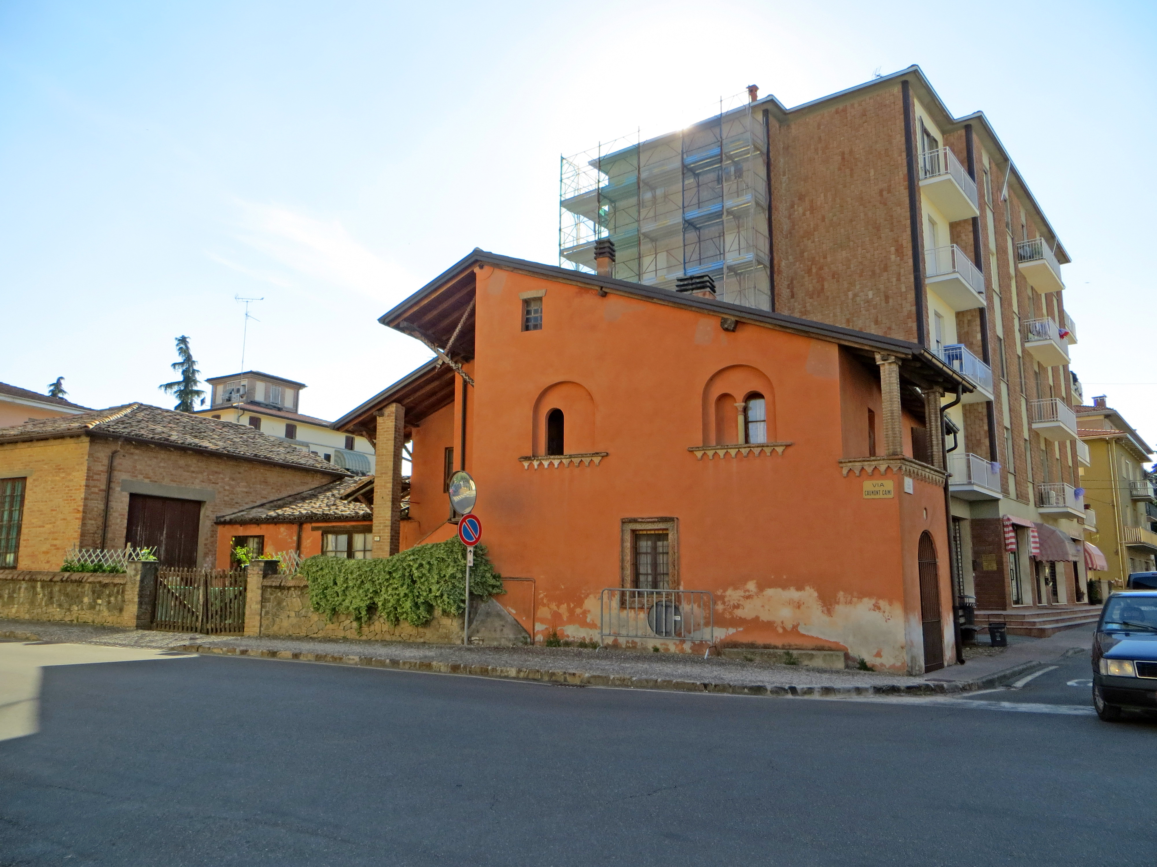 Villa Caumont Caimi (Felino) - Casa del Rigoletto